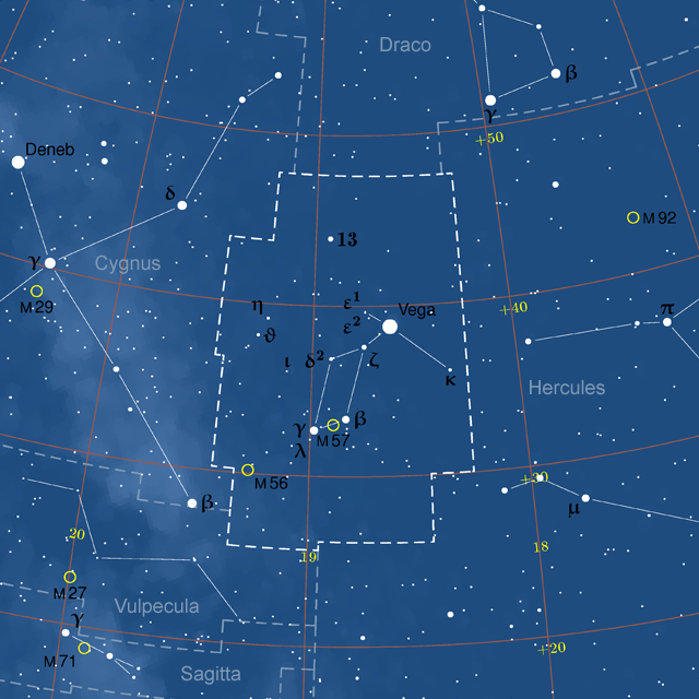 Lyyran tähdistön kartta. Kartta on tehty PP3-ohjelmalla.